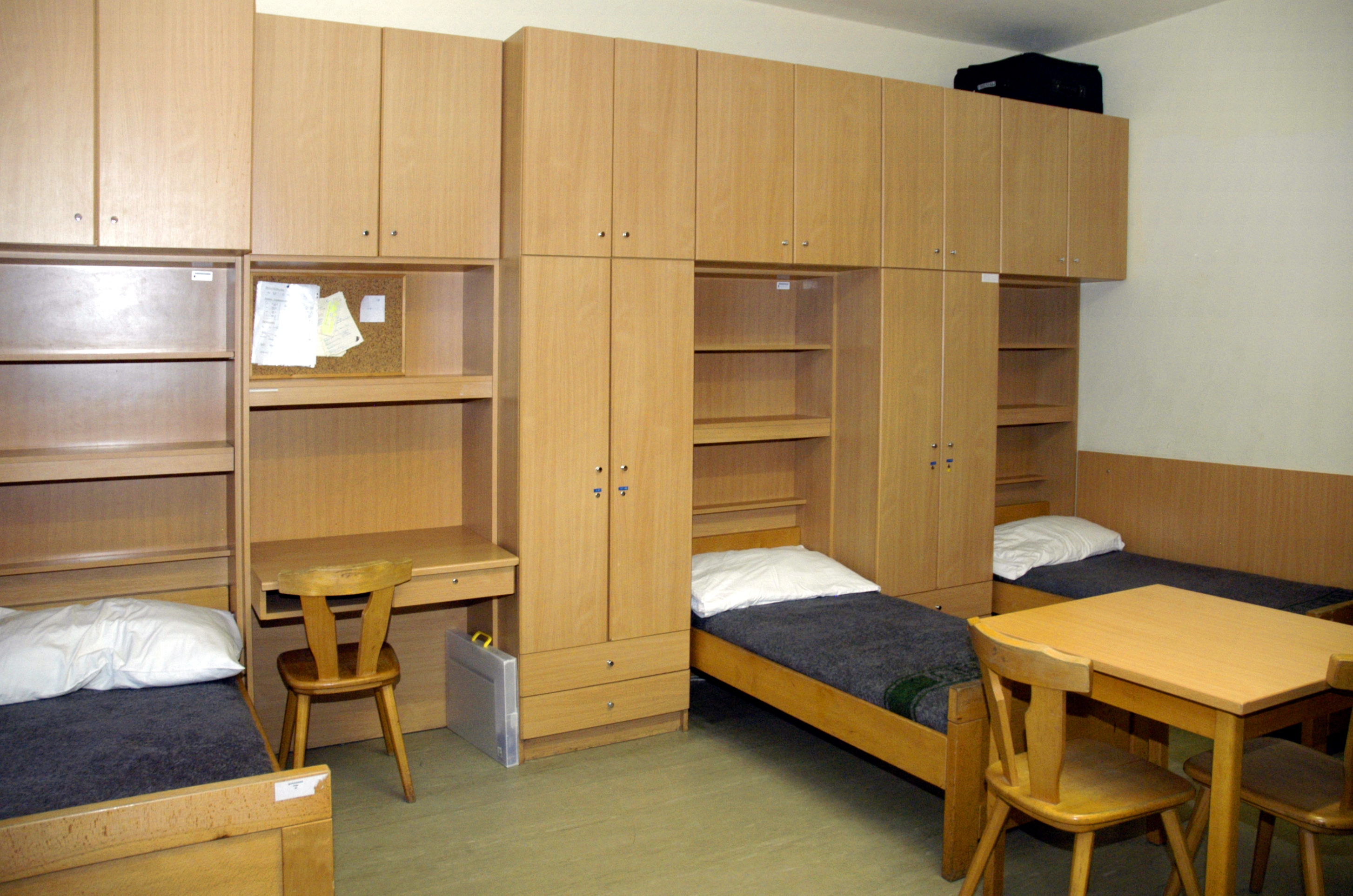 Zimmer im Internat des Militärrealgymnasiums Wiener Neustadt